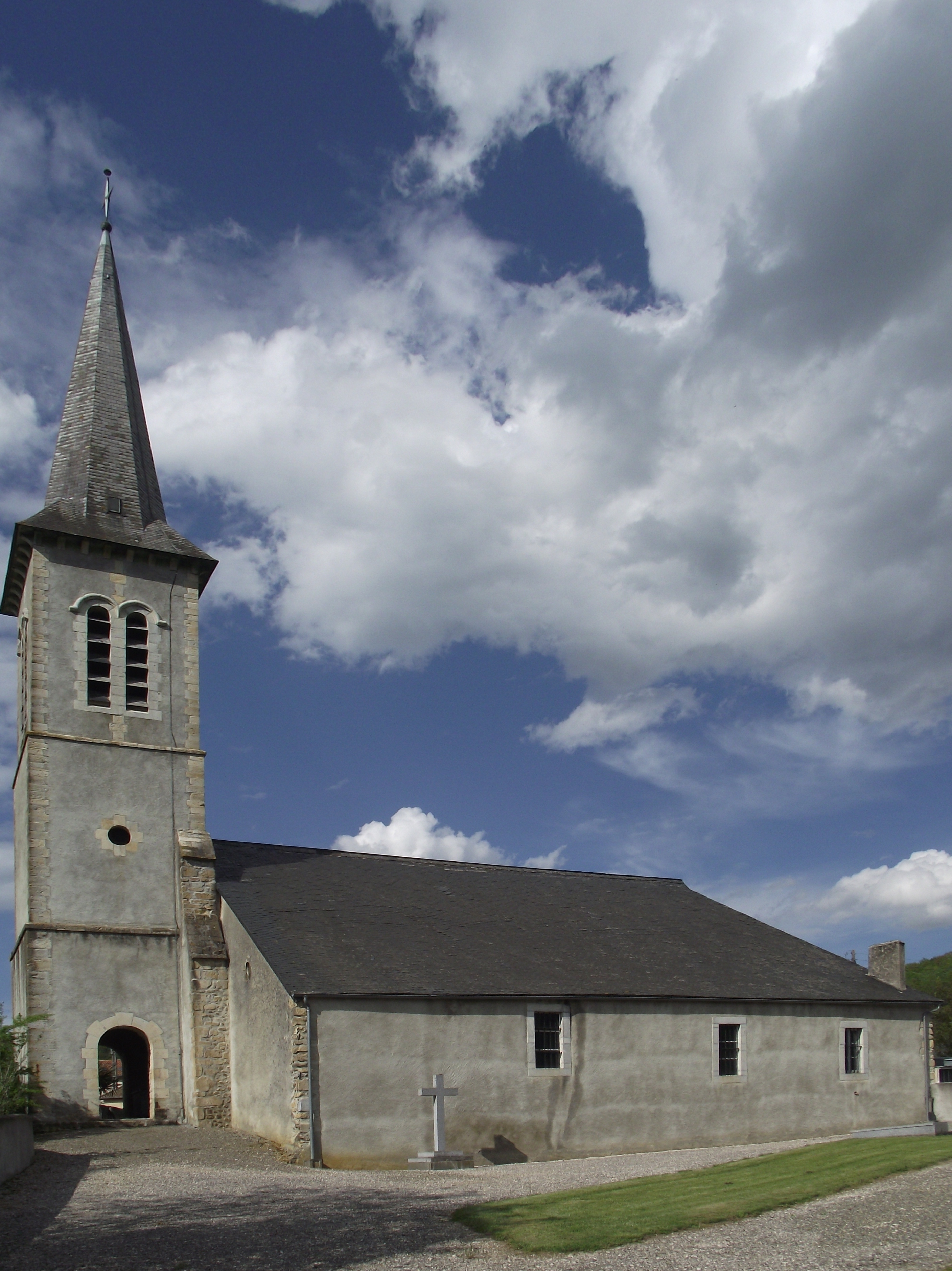 Église de Lanespède (Hautes-Pyrénées, France)